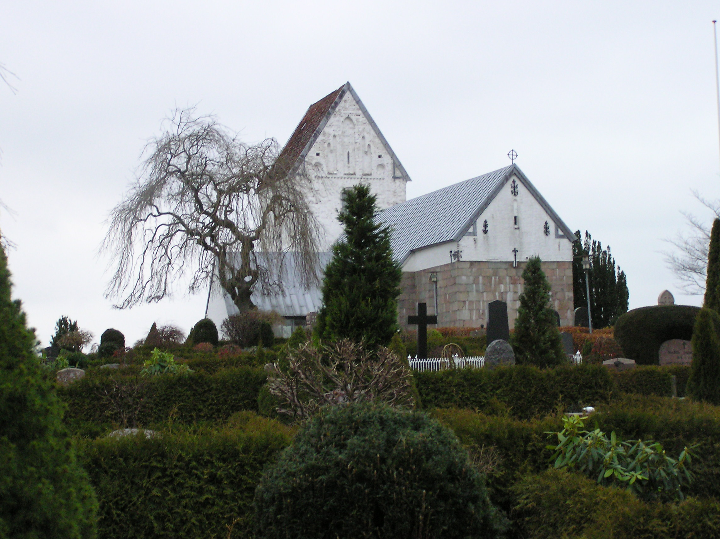 Ulsted Kirke,Aalborg Stift